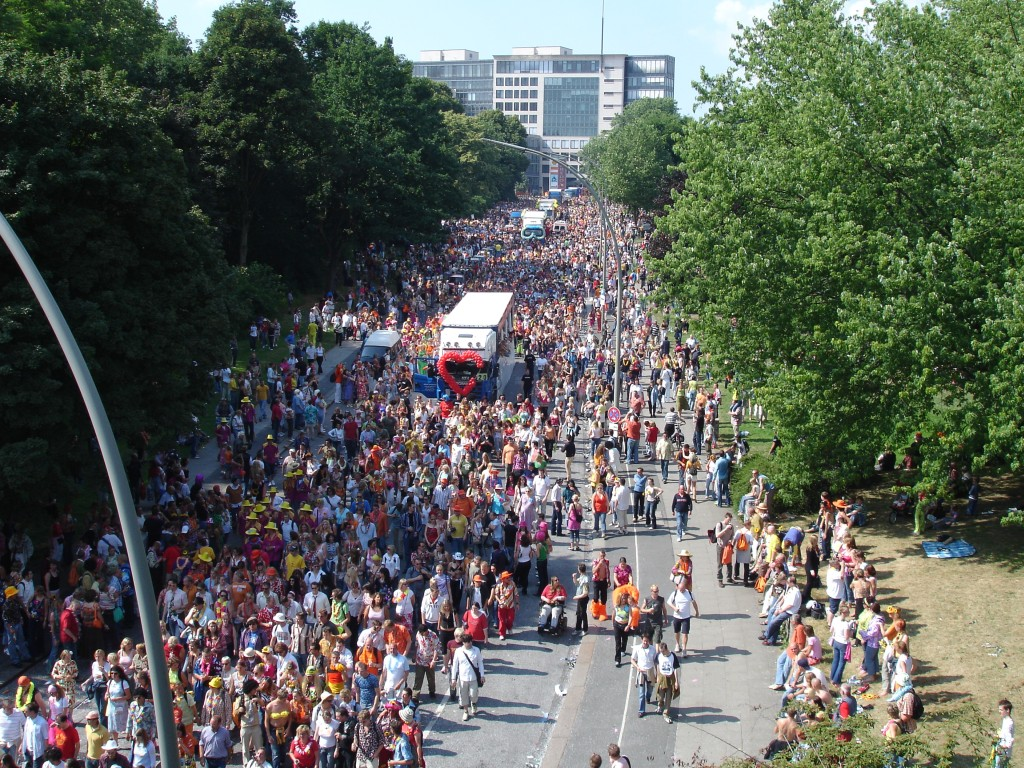 Schlagermove in Hamburg (Helgoländer Allee), 2.7.2005.